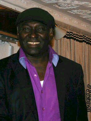 Nigerian born actor, Clem Ohameze.